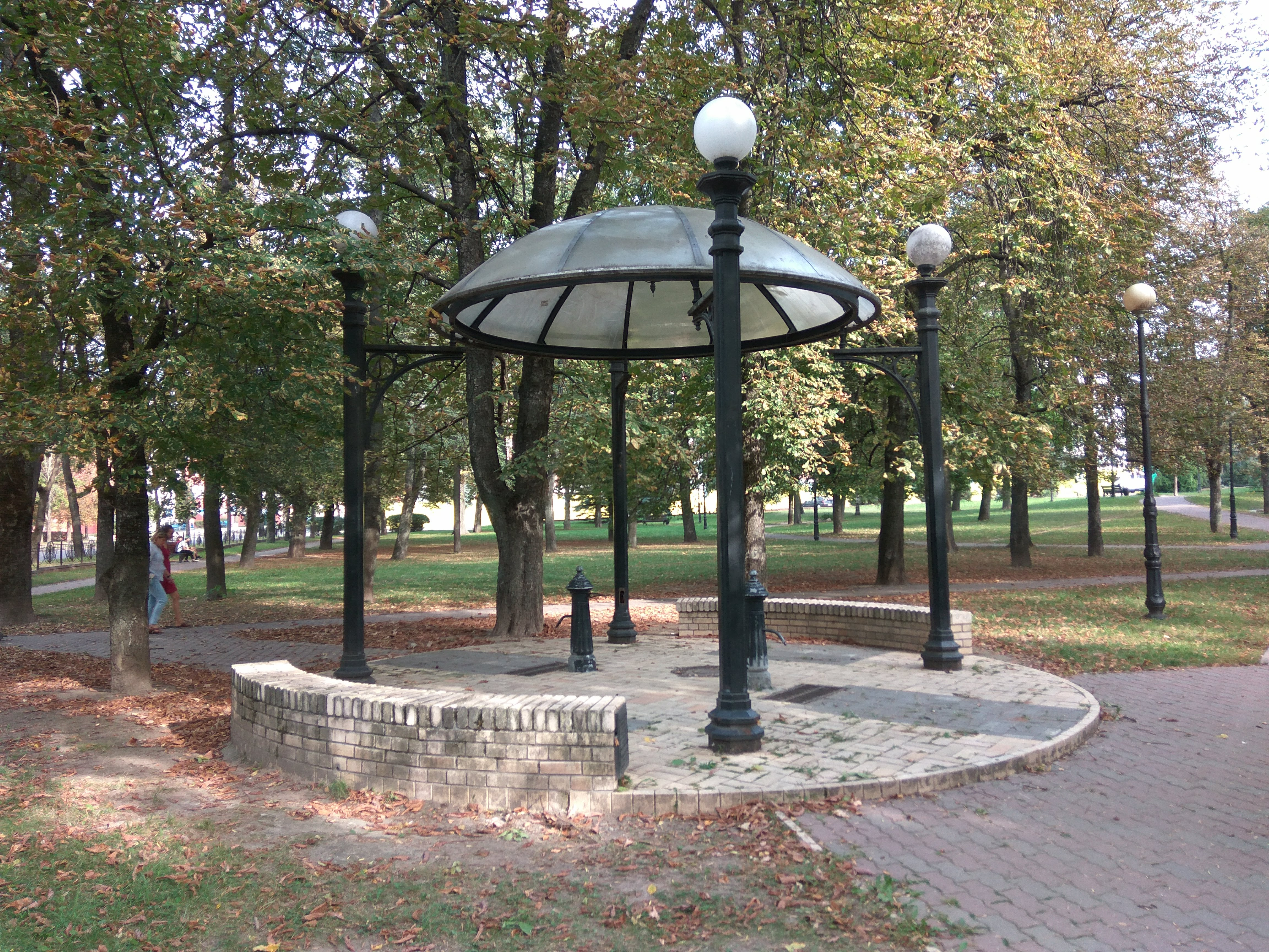 Мінск. Сцяпанаўскі сад